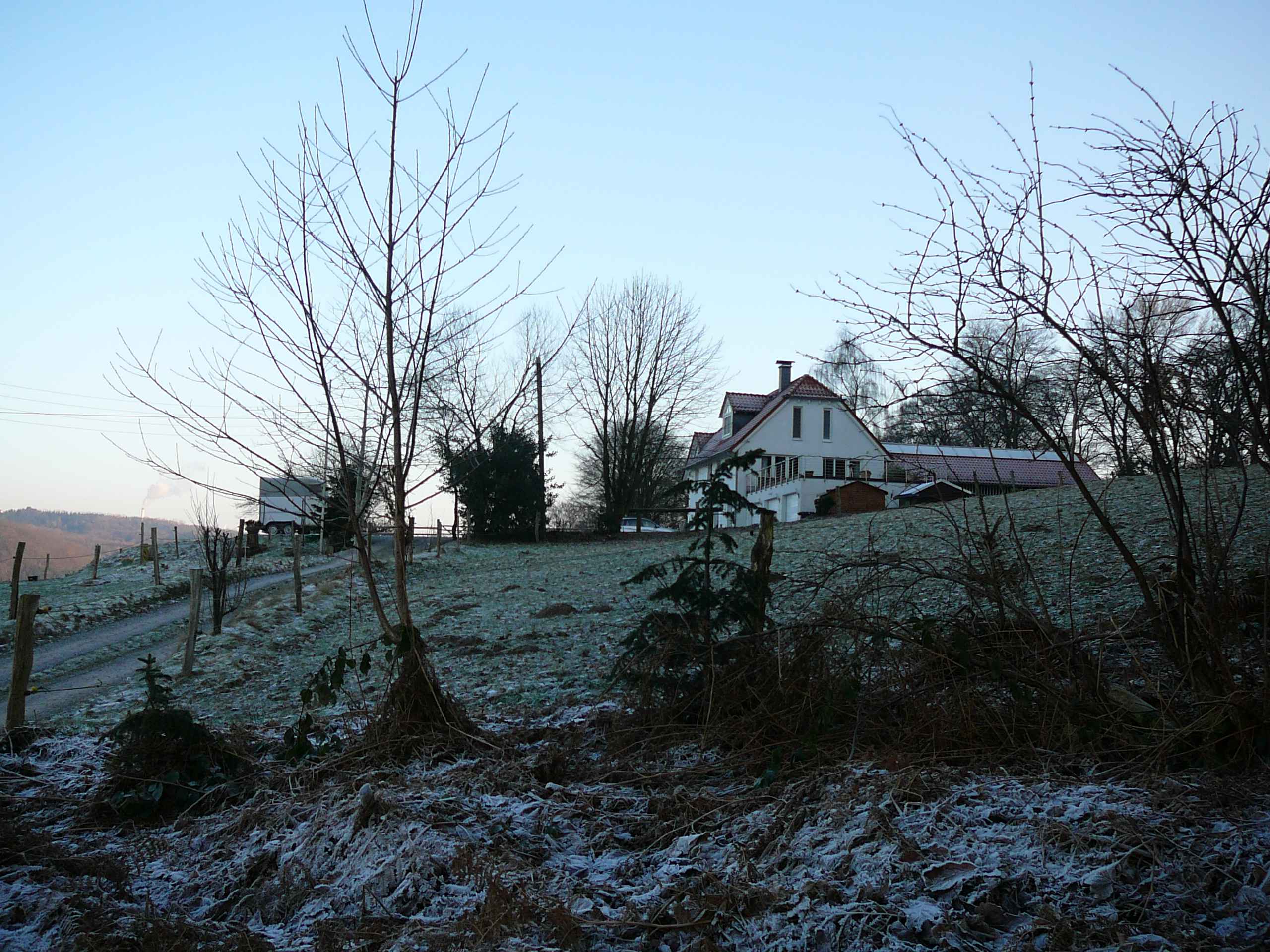 Mühlenpfad, Wuppertal